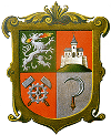 Wappen der Gemeinde Wies, Steiermark, gültig bis Ende 2014